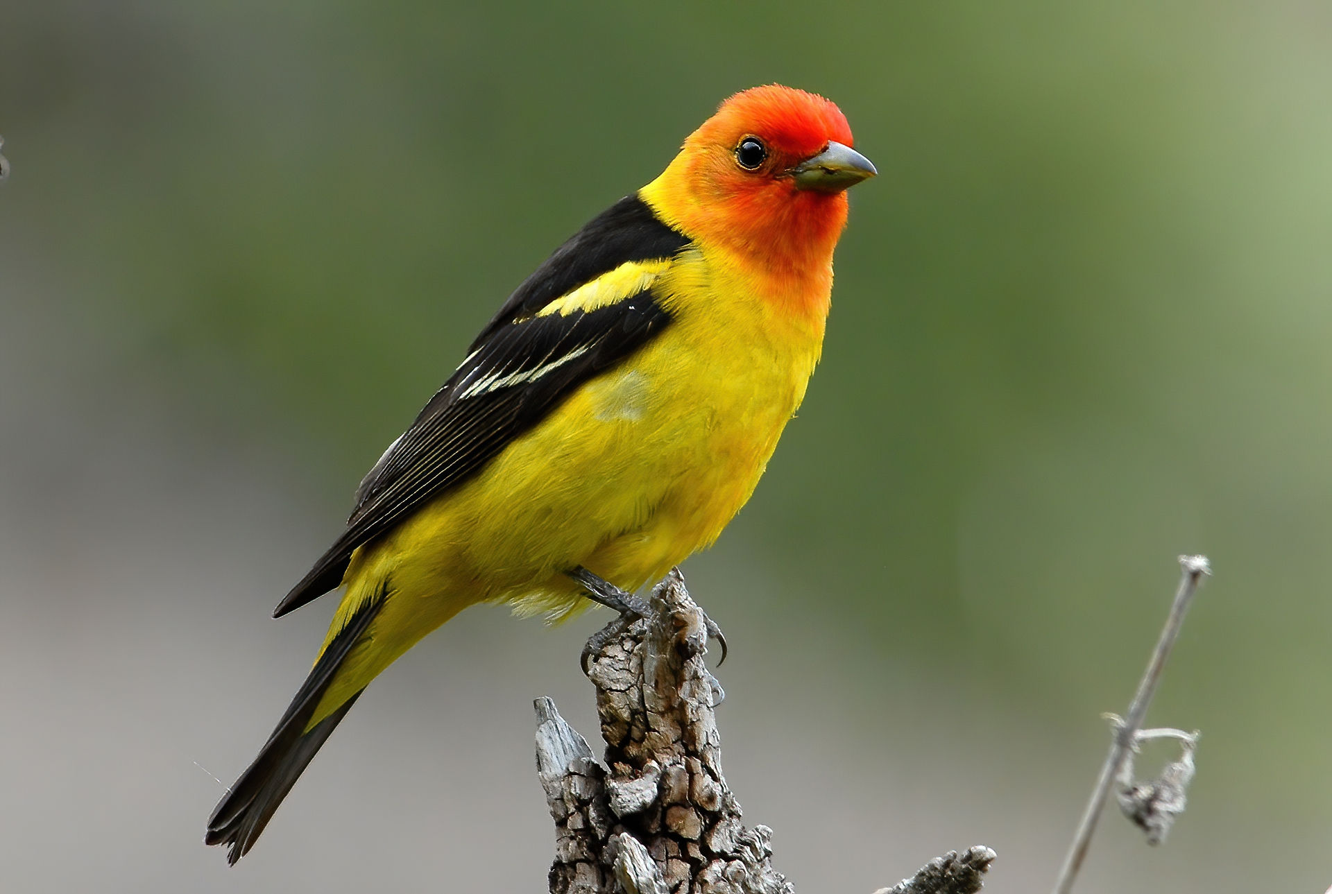 Western Tanager